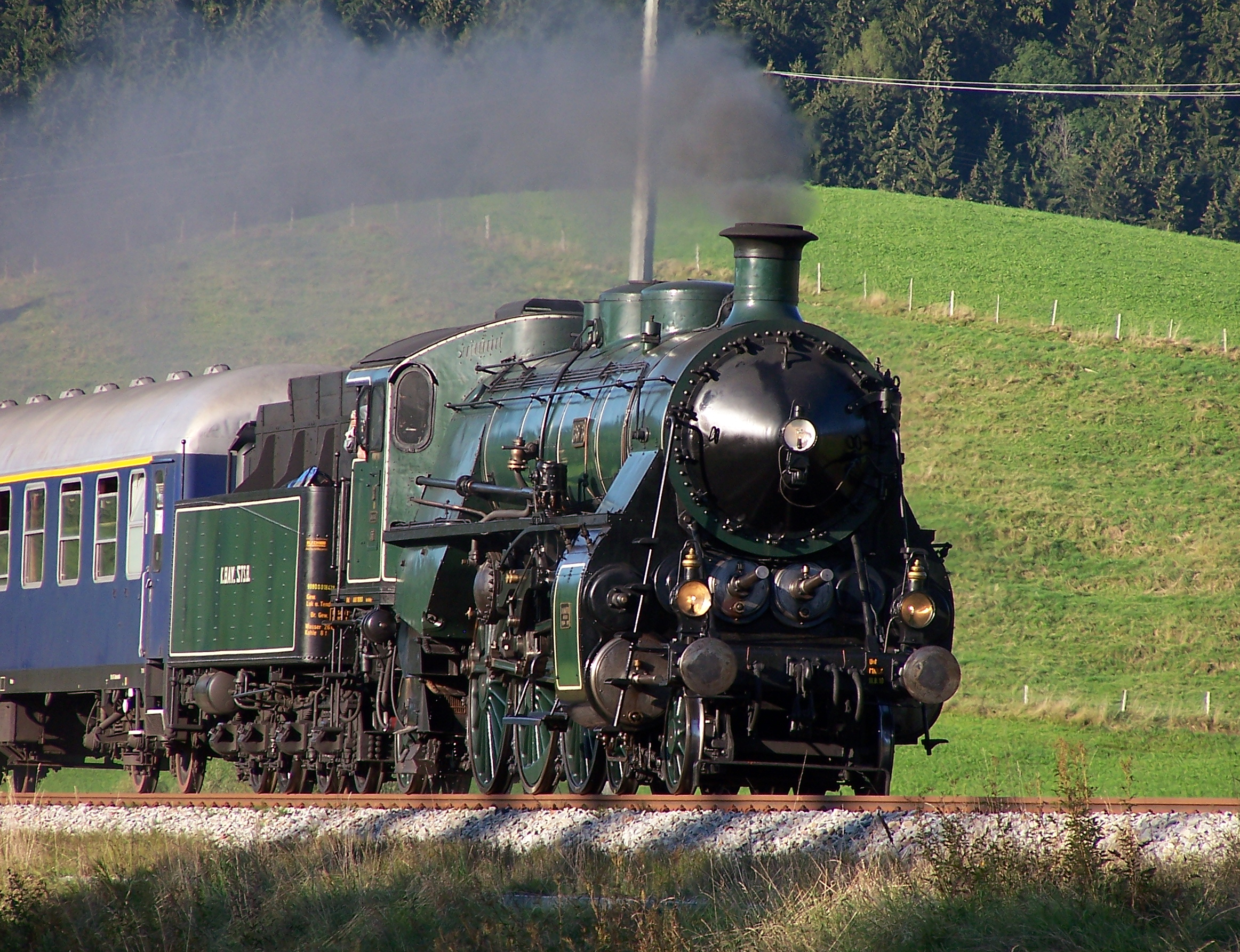 S 3/6 vor Oberstaufen Richtung Kempten